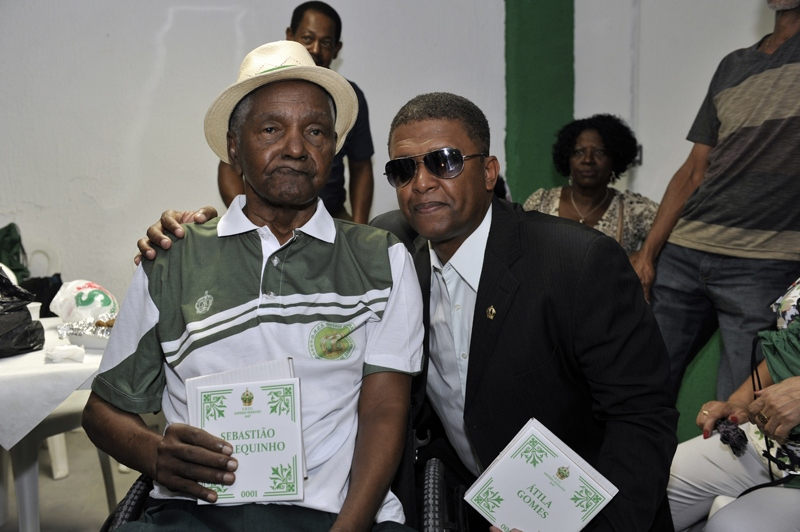 Reinauguração da quadra do Império Serrano.Foto: Ricardo Almeida.